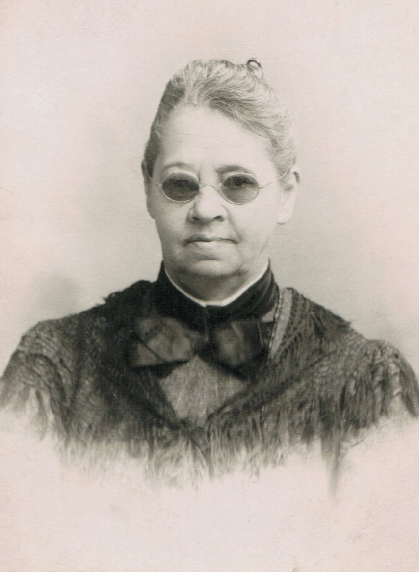 Маргарита Викторовна Каринская (урожд. Зотикова)